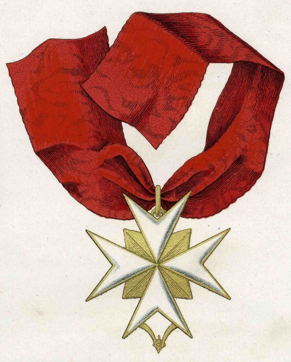 Scan aus altem Ordensbuch der Erzbischöflichen Diözesan- und Dombibliothek Köln, gemeinfrei Erzbischöfliche Diözesan- und Dombibliothek Köln Kardinal-Frings-Straße 1-3, 50668 Köln schreibt am 10.02.2005: Wir haben die betr. Grafik aus einem älteren Ordenslexikon, dessen genaue bibliographische Angaben ich nicht ermitteln kann. Vermutlich liegen kleine Urheberrechte mehr vor. Mir stellt sich gerade aber auch die Frage, ob Abbildungen von Orden überhaupt dem Urheberrecht unterliegen. Viele Grüße und einen schönen Tag! Stefan Spengler